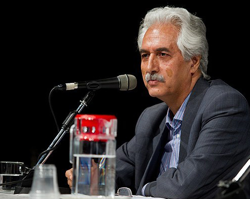 ۱۳۹۱/۱/۳۰ بهروز وجدانی در مراسم رونمایی از آلبوم موسیقایی نوروز و بهار ایرانی